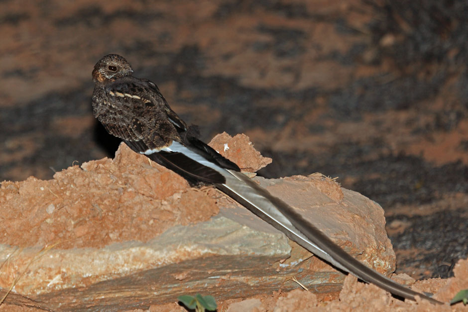 Pennant-winged Nightjar, Luita, DRC